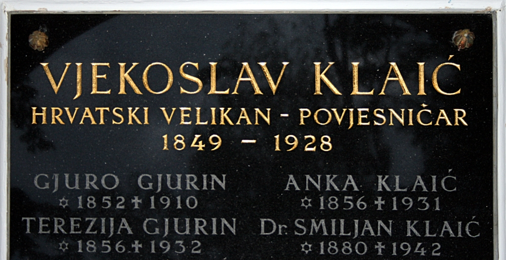 Grob Vjekoslava Klaića na Mirogoju u Zagrebu